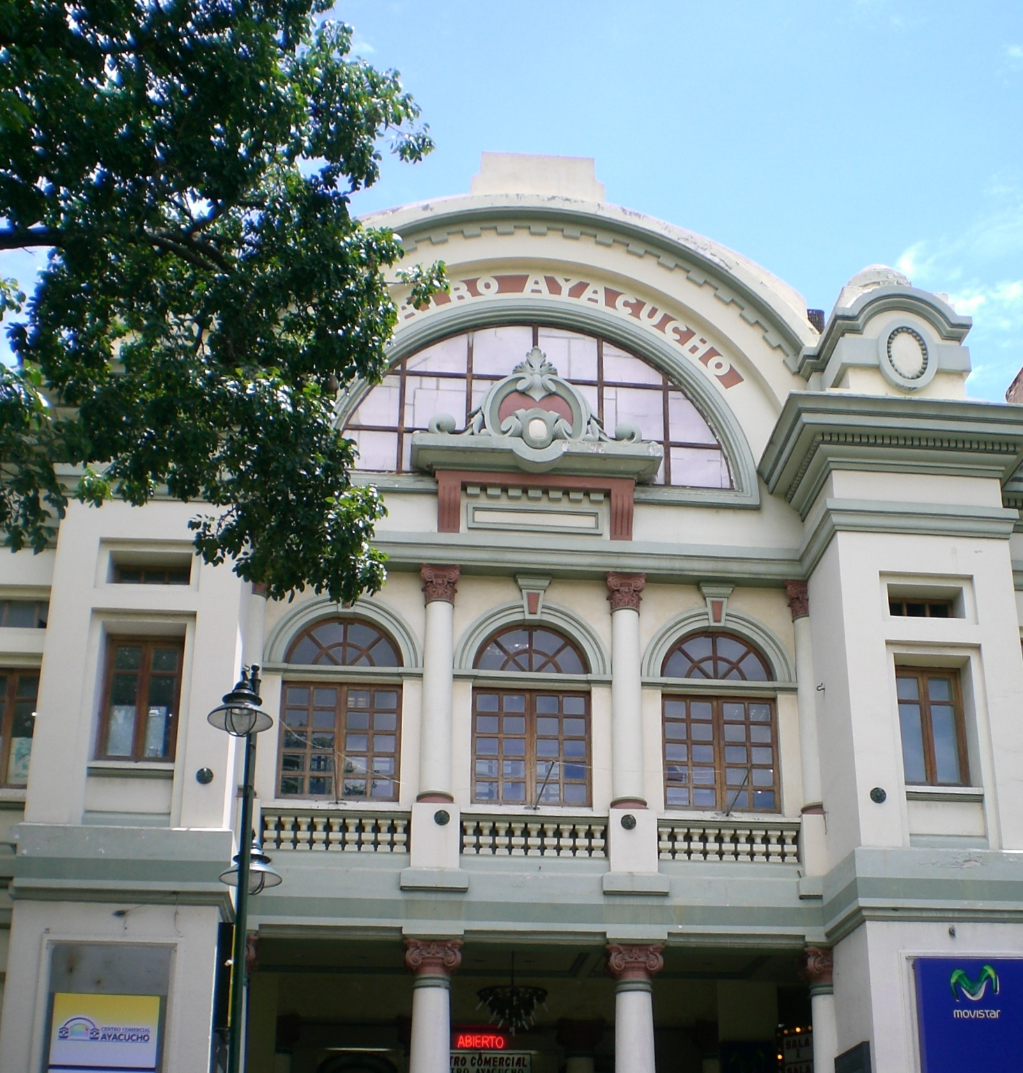 Teatro Ayacucho, Caracas, Venezuela.